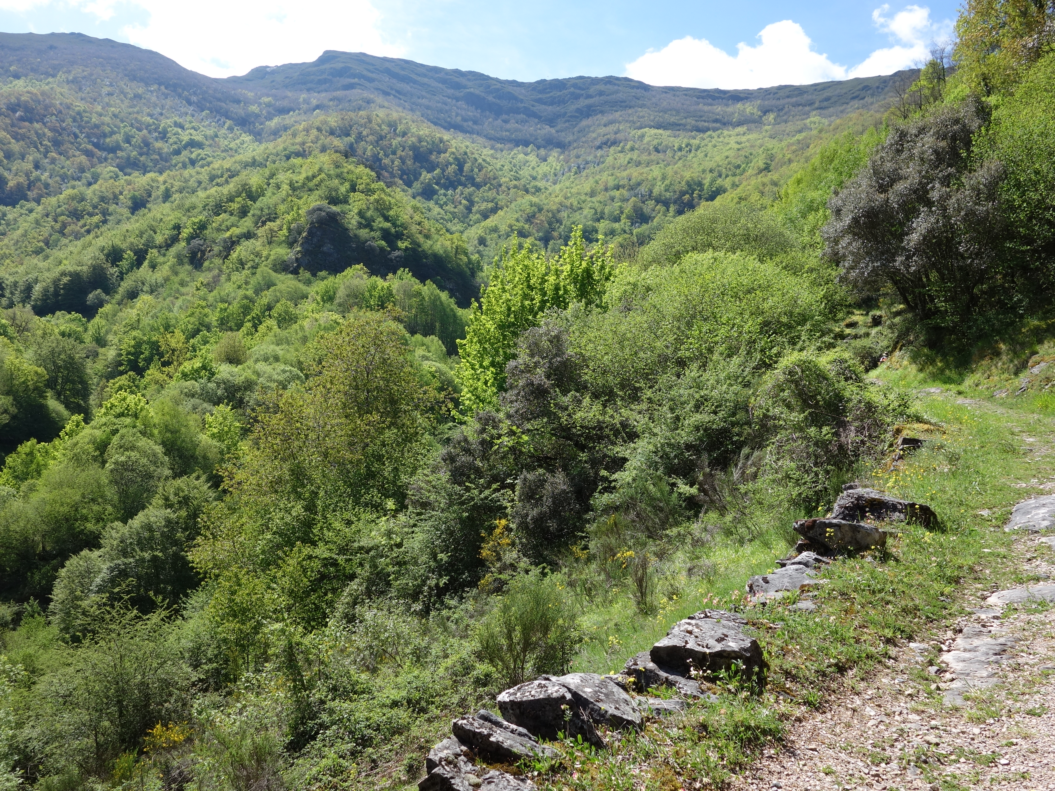 La Devesa da Rogueira cerca de Moreda (O Courel) This is a photography of a Site of Community Importance in Spain with the ID: ES1120001. Natura2000 entry, EEA entry